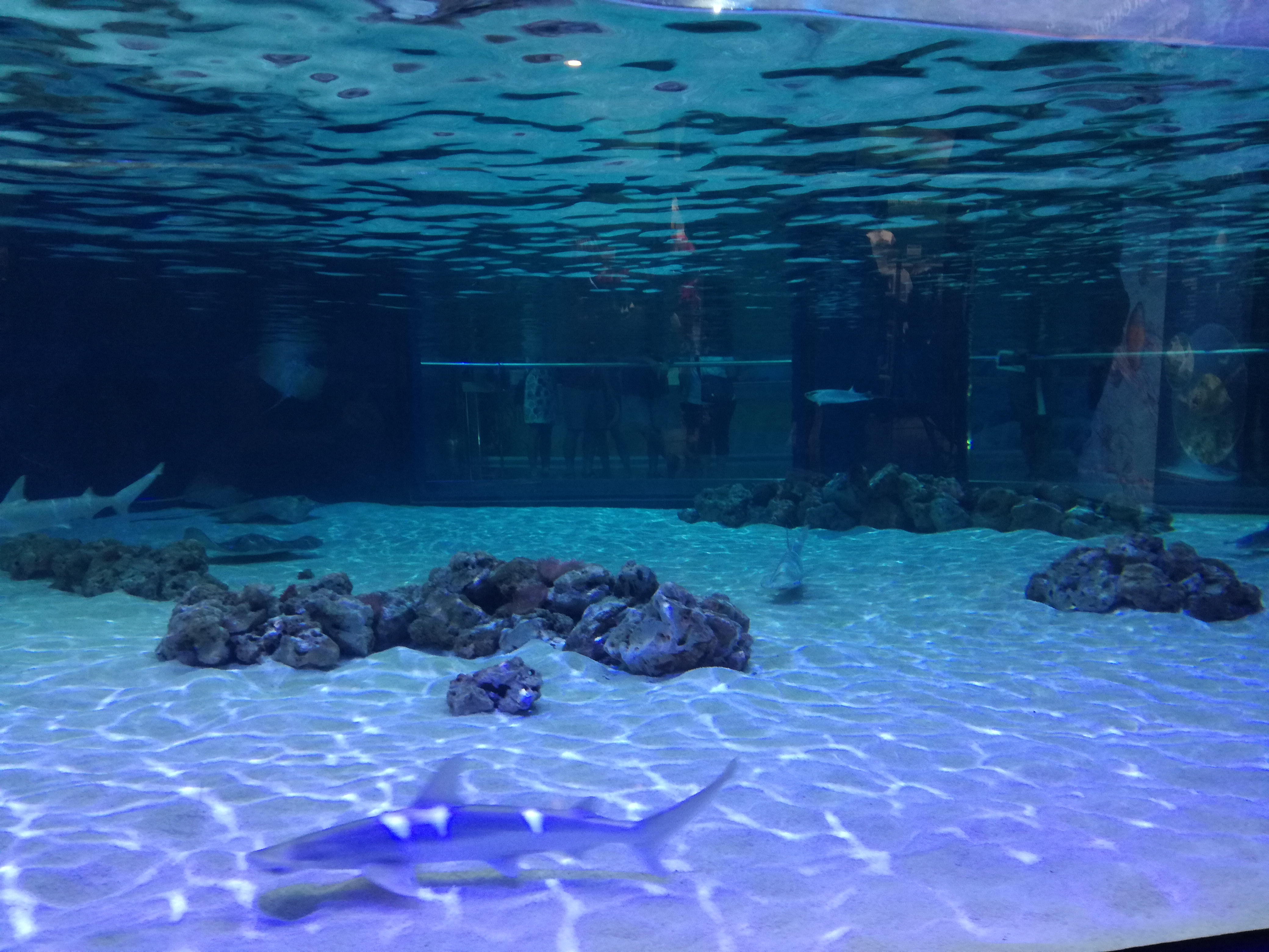 Museo oceanografico di Valencia